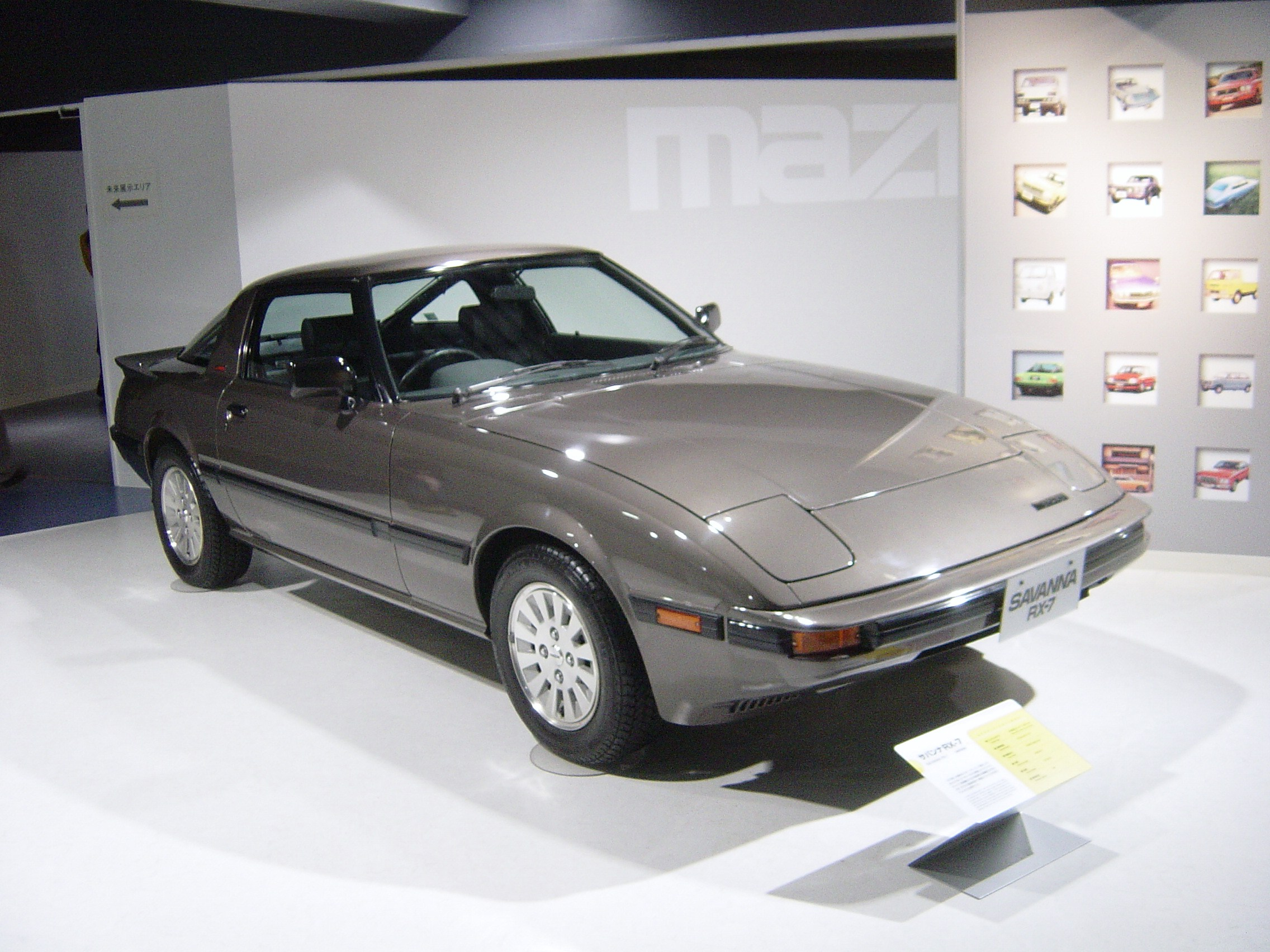 Mazda RX7 1st generation(マツダ・RX-7、Mazda RX-7),Mazda Museum.